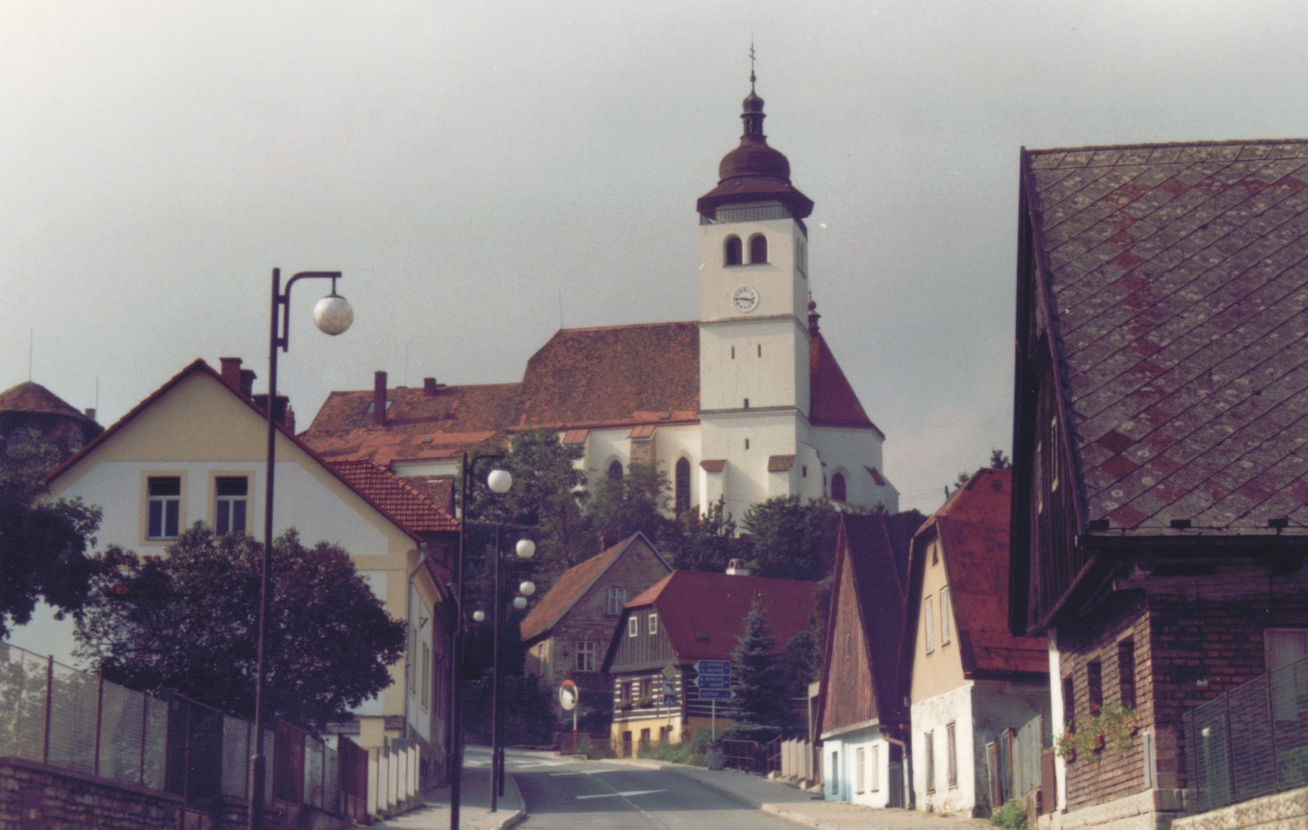 Nové Město nad Metují, kostel Nejsv. Trojice